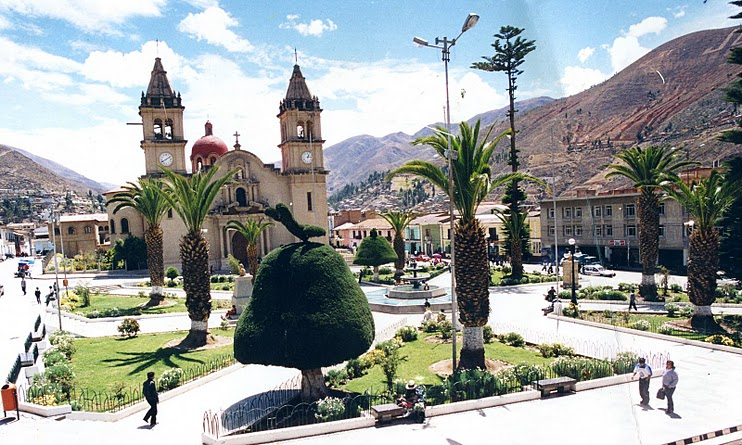 la foto de mi tierra